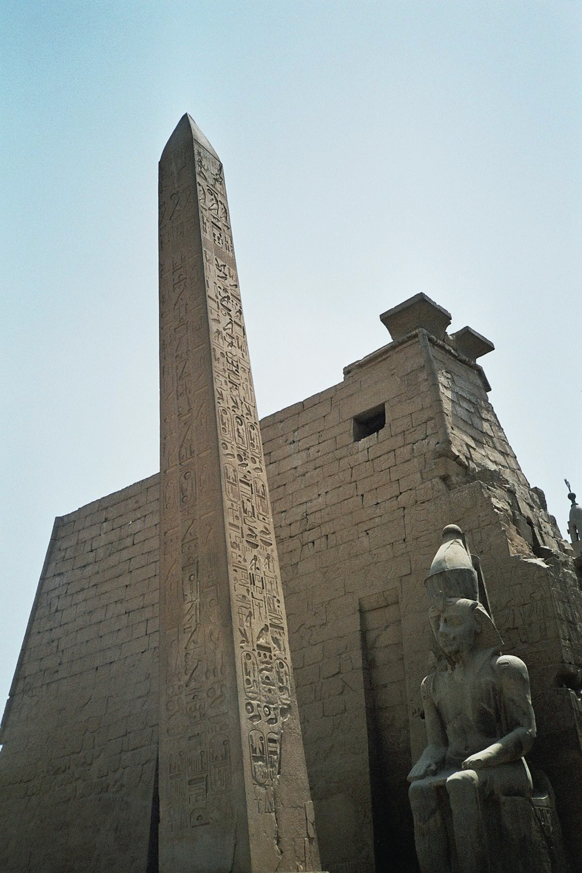 Obelisk en Luxor Tempel, Egypte